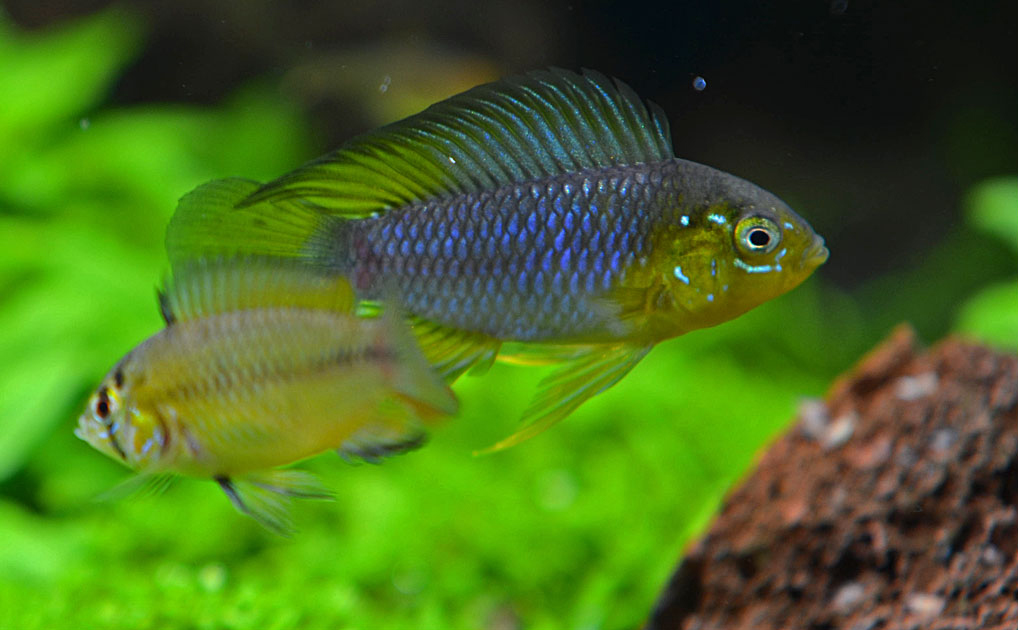 Ein Apistogramma borellii Pärchen in Naturform. Man sieht schön die unterschiedlichen Größen und Farben der Geschlechter. Rechts das größere Männchen.